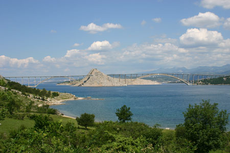 Brug naar Eiland KRK, eigen foto juli 2004, hiermee onder gnu/fdl gebracht.)